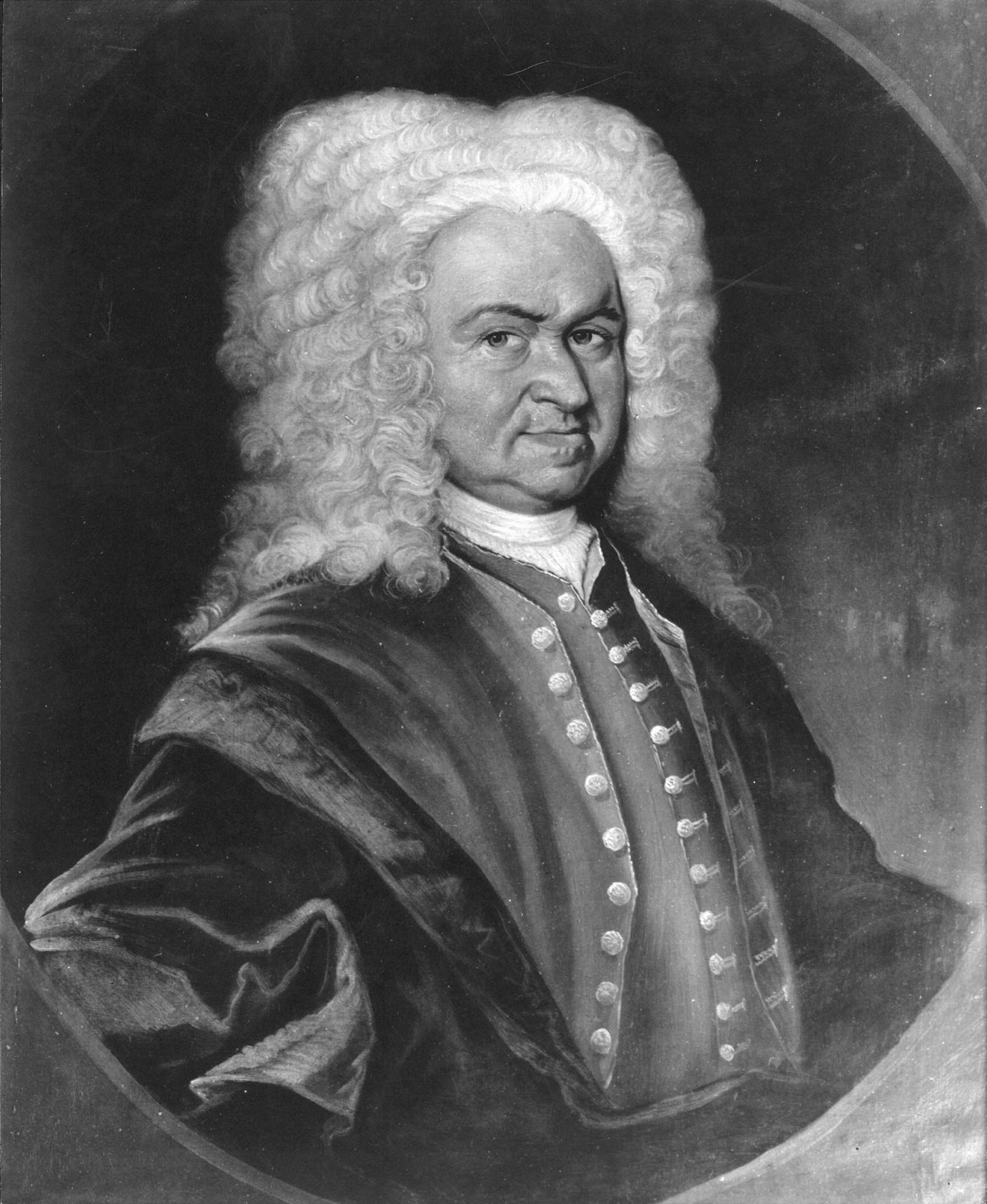 Reinholdt Ziegler (1677-1720) - Gods- gård- og jernverkseier i Oppland og på Hedemarken.